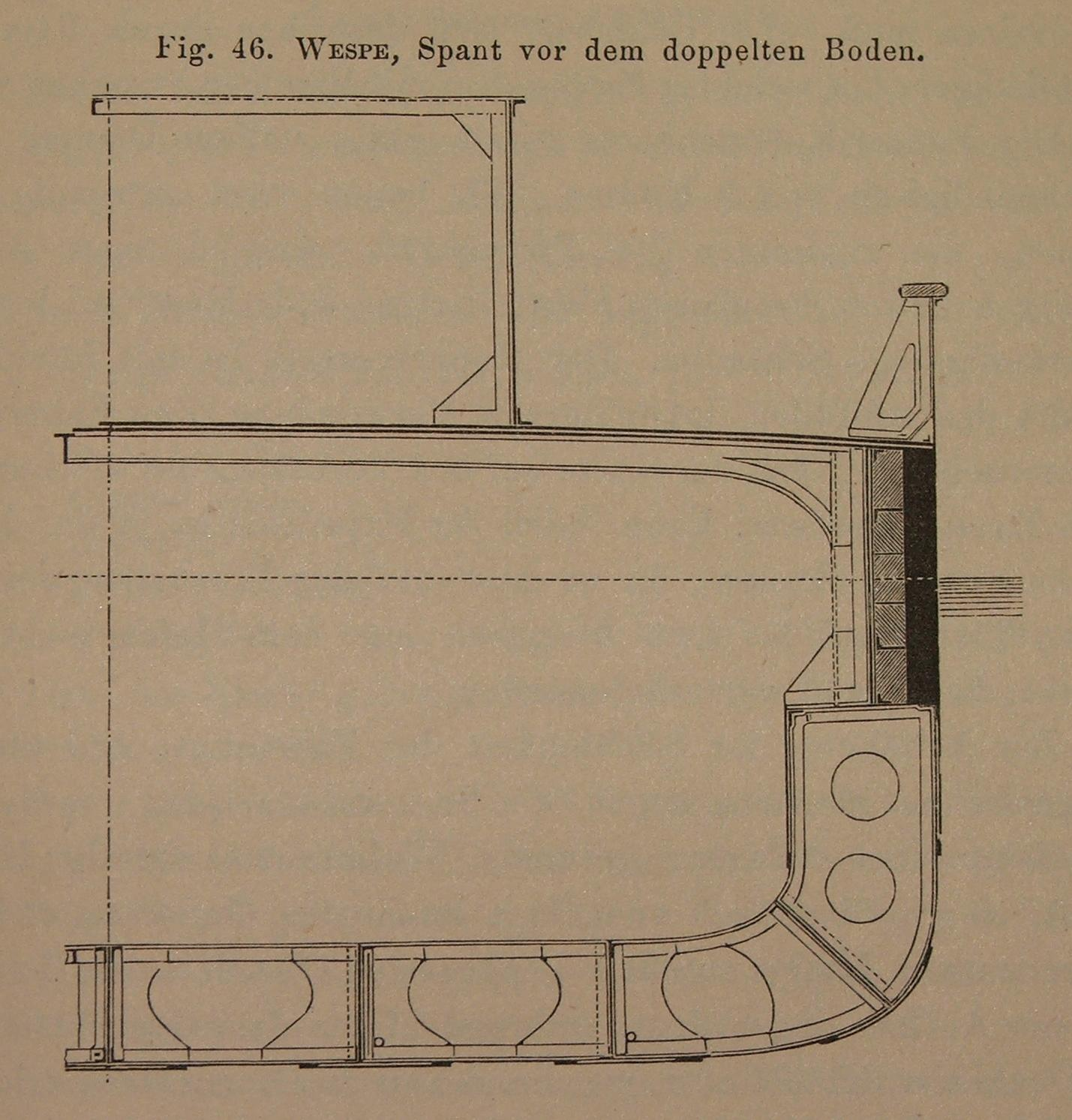 SMS Wespe Fig._46 von Kronenfels, J. F.: Das schwimmende Flottenmaterial der Seemächte. Eine kurzgefasste Beschreibung der wichtigsten europäischen, amerikanischen und asiatischen Kriegsschiffe der neueren und neuesten Zeit. A. Hartleben's Verlag, Wien. Pest. Leipzig 1881.